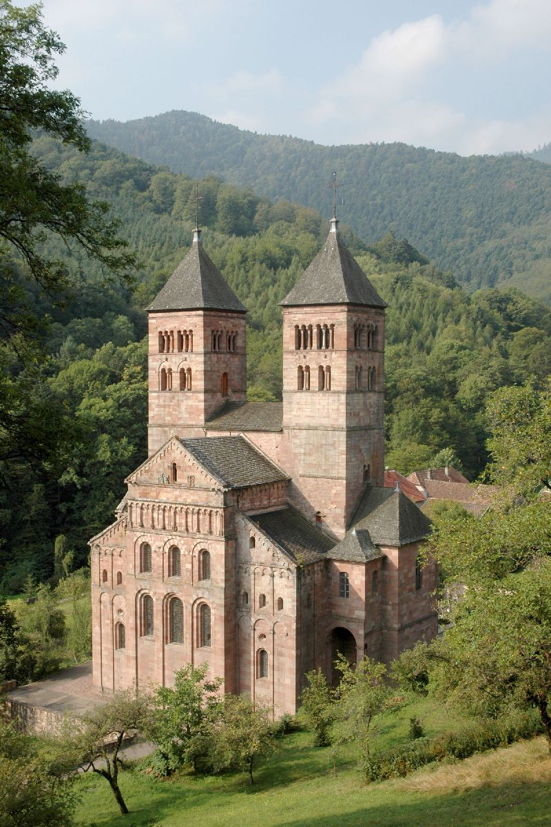 Kloster Murbach mit der St. Leodegar-Kirche am Fuß des Großen Belchen im Elsass Kamera: Nikon D 70 Software: GIMP